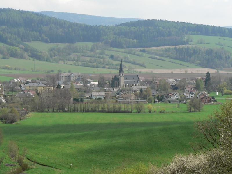 Rapotín, centrum obce.